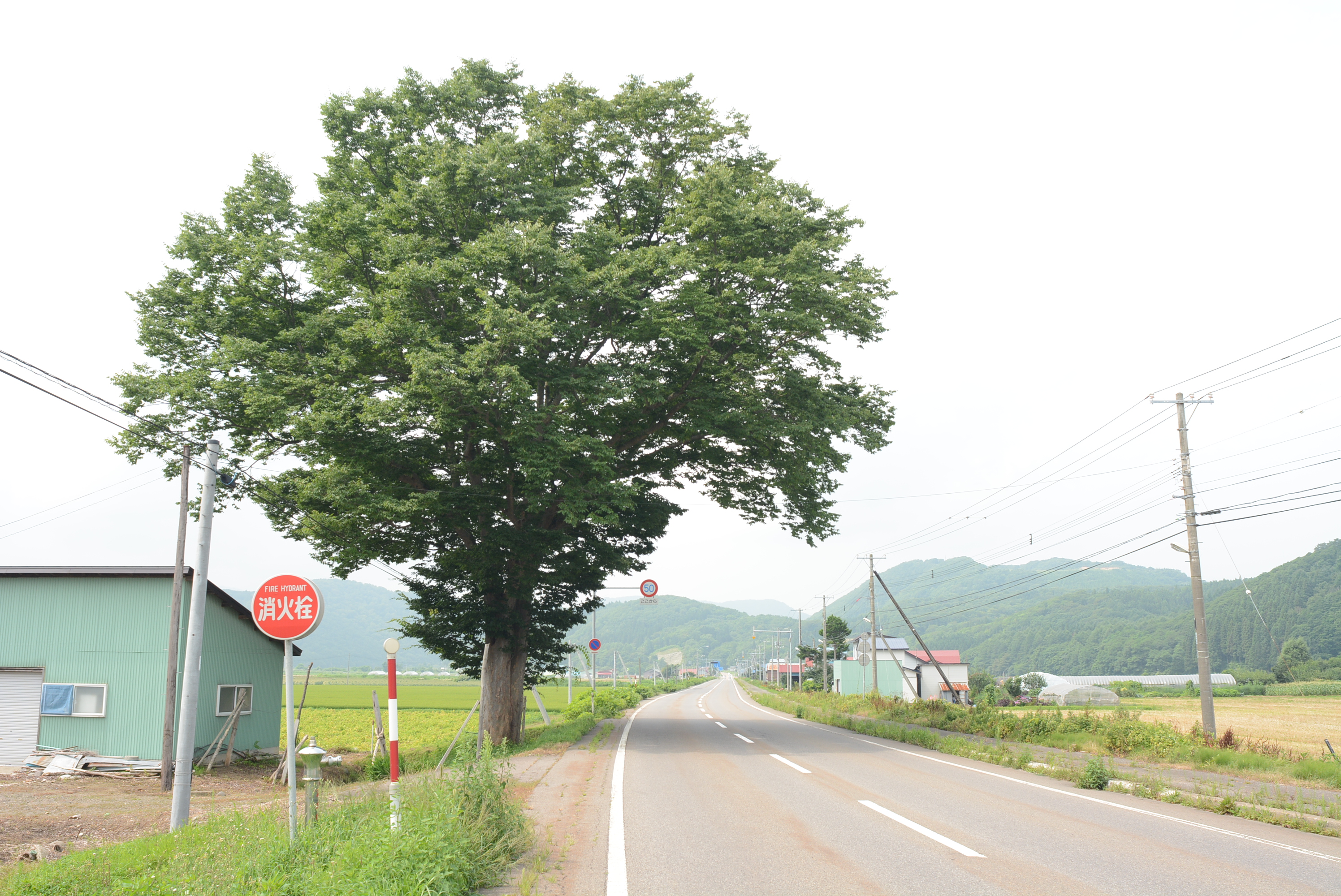 北海道厚沢部町字鶉の国道227号沿いあるケヤキ。